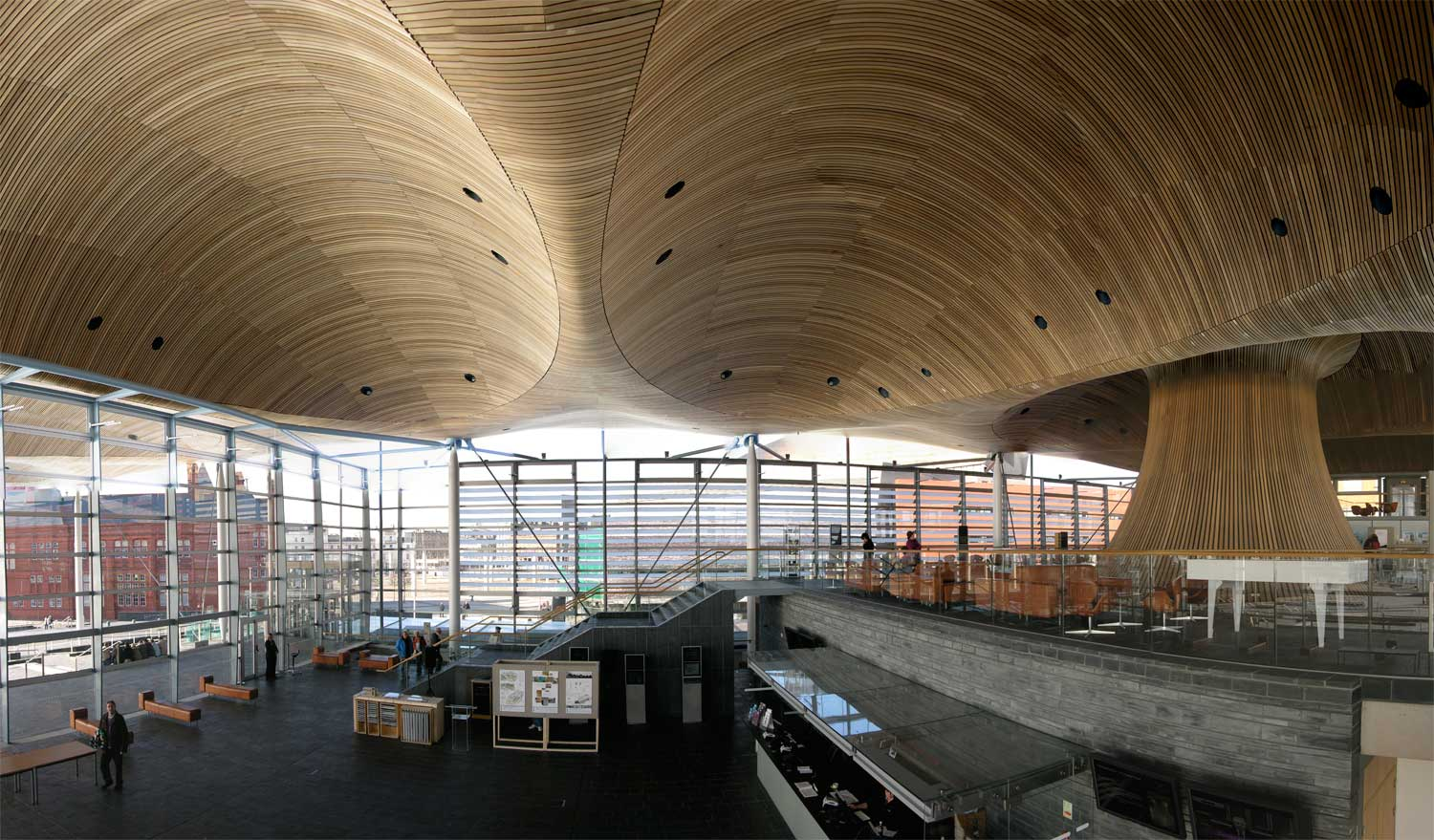 Neuadd & Oriel, Senedd, Cardiff Bay, Wales.